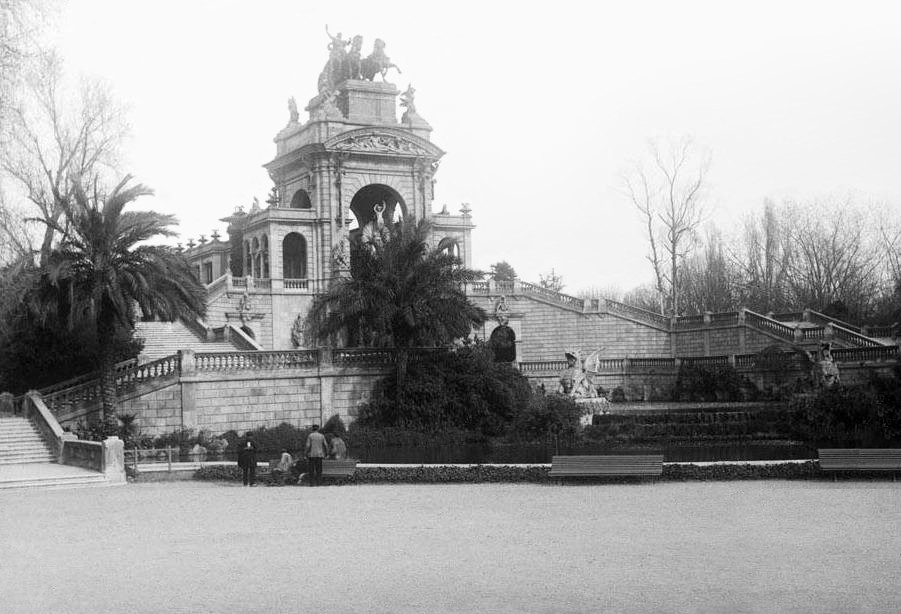 Imatge